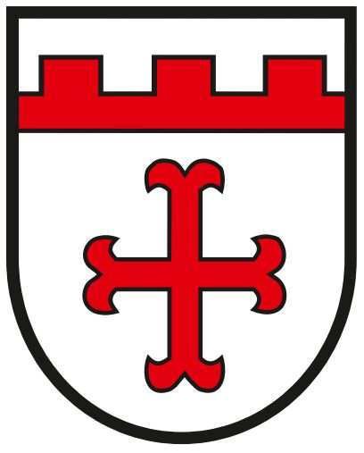 Wappen Sommerau